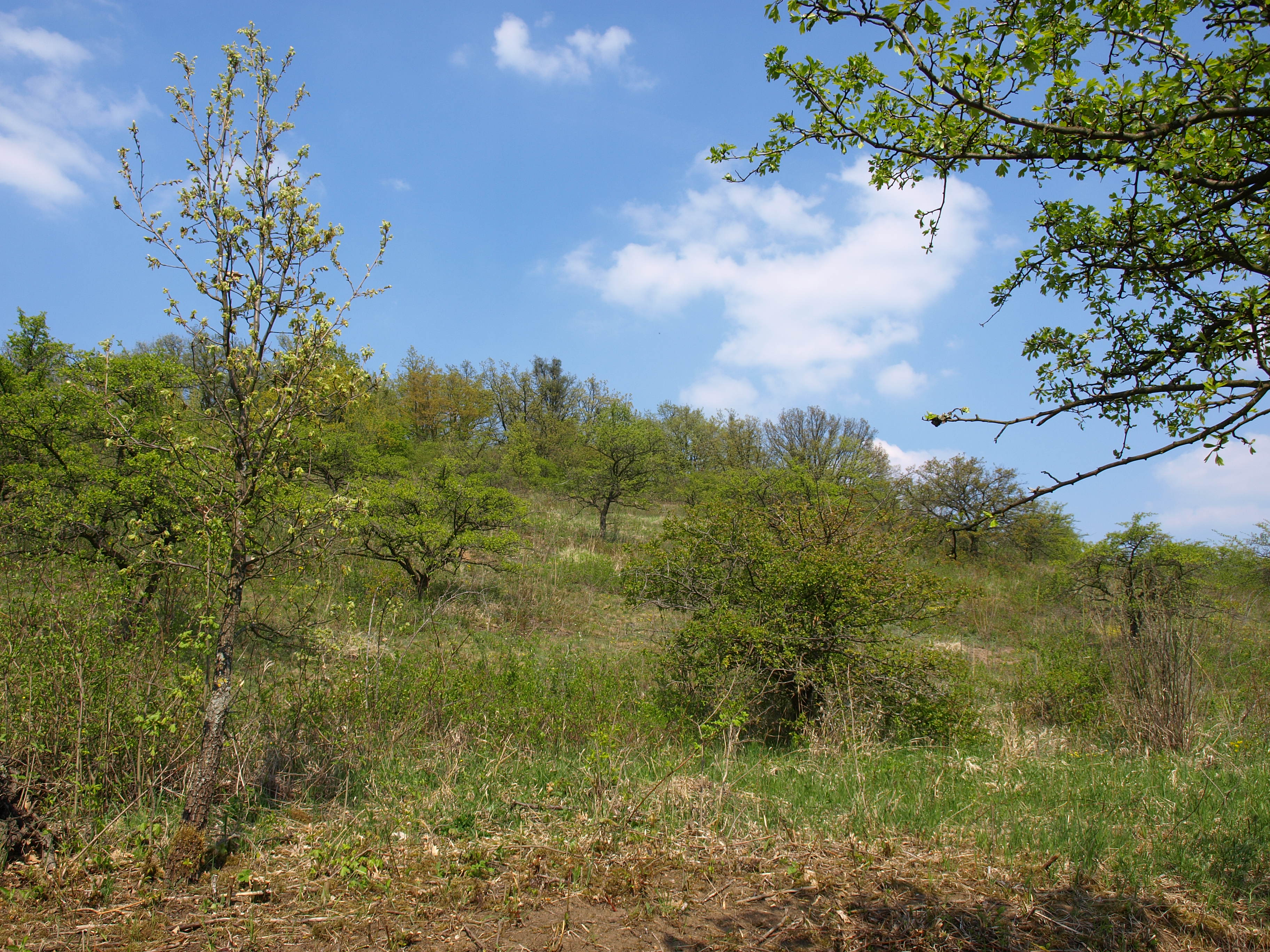 Přírodní rezervace Velká Klajdovka, Brno.